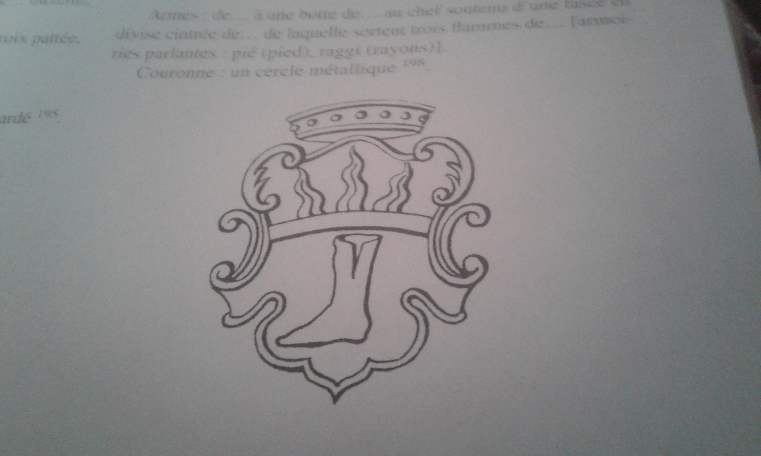 sceau de leonardo Pieraggi à partir d'anciennes armoiries